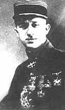 Depicted person: Pavel Argeyev – Russian flying ace